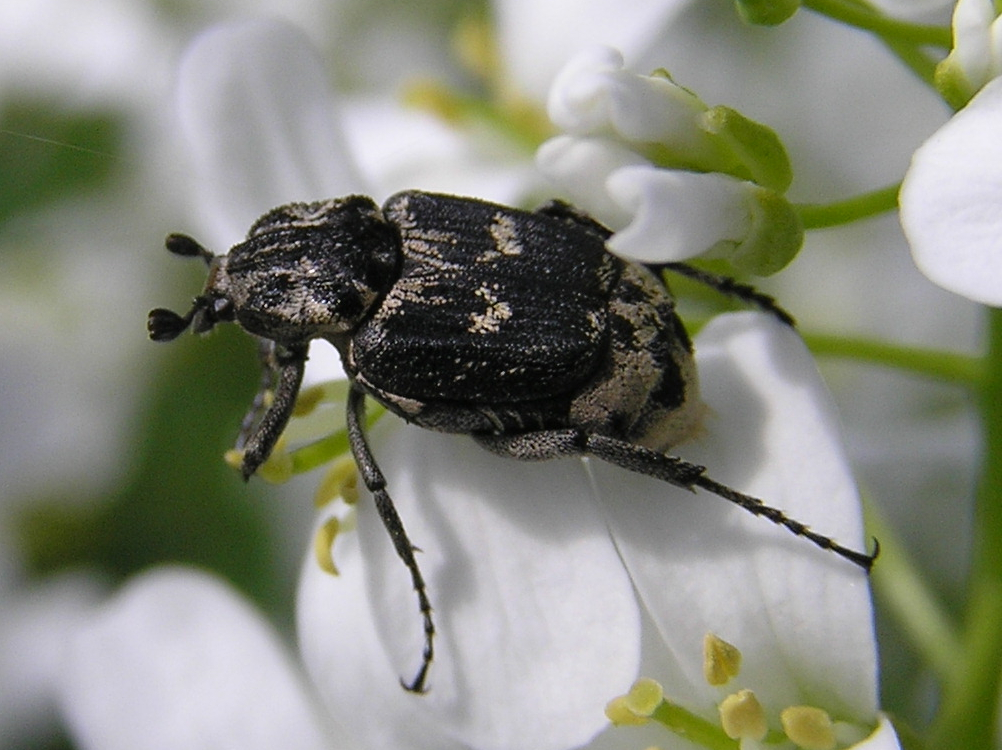 Valgus hemipterus, Białowieża, Polska